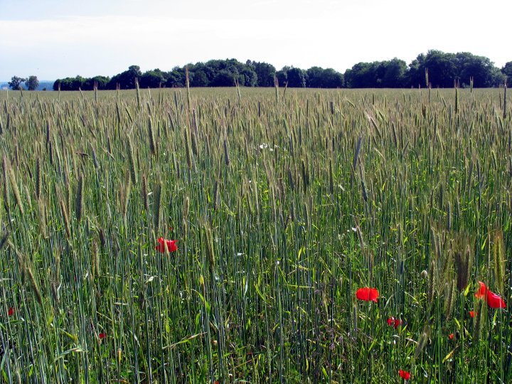 Kornmark. juni 2005 ved Kolle-Kolle, Værløse